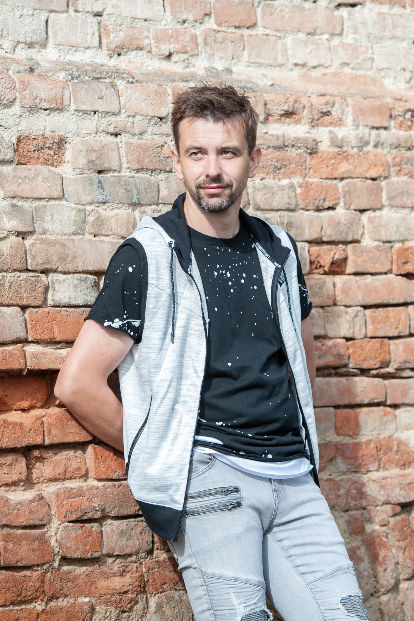 Fotografie vedoucího hudební skupiny GOOD WORK